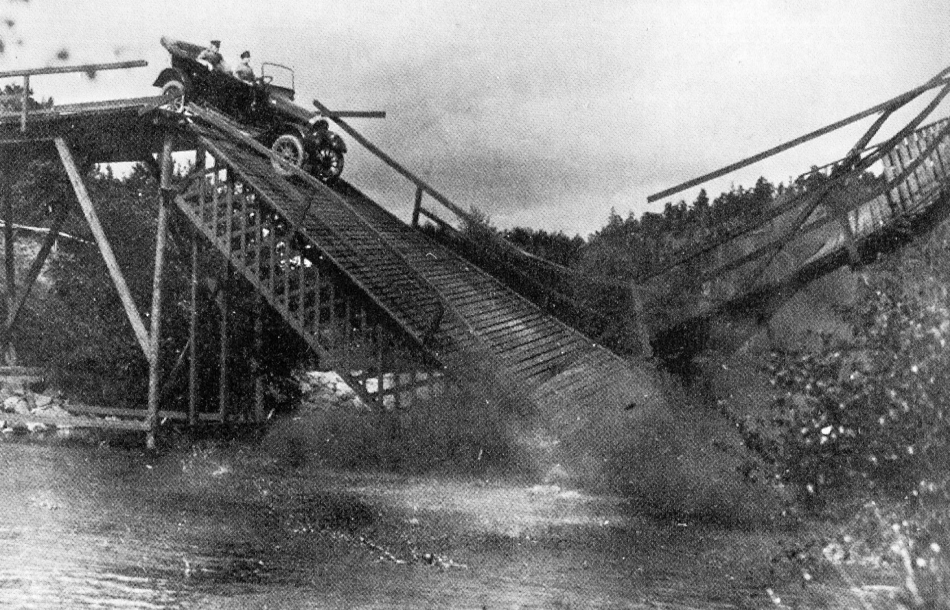 Bro över Flottsbrokanalen sprängs för filmen "Unga greven tar flickan och priset "